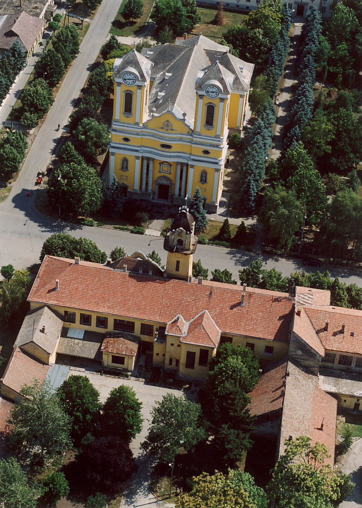 Battonya - Hungary - Europe